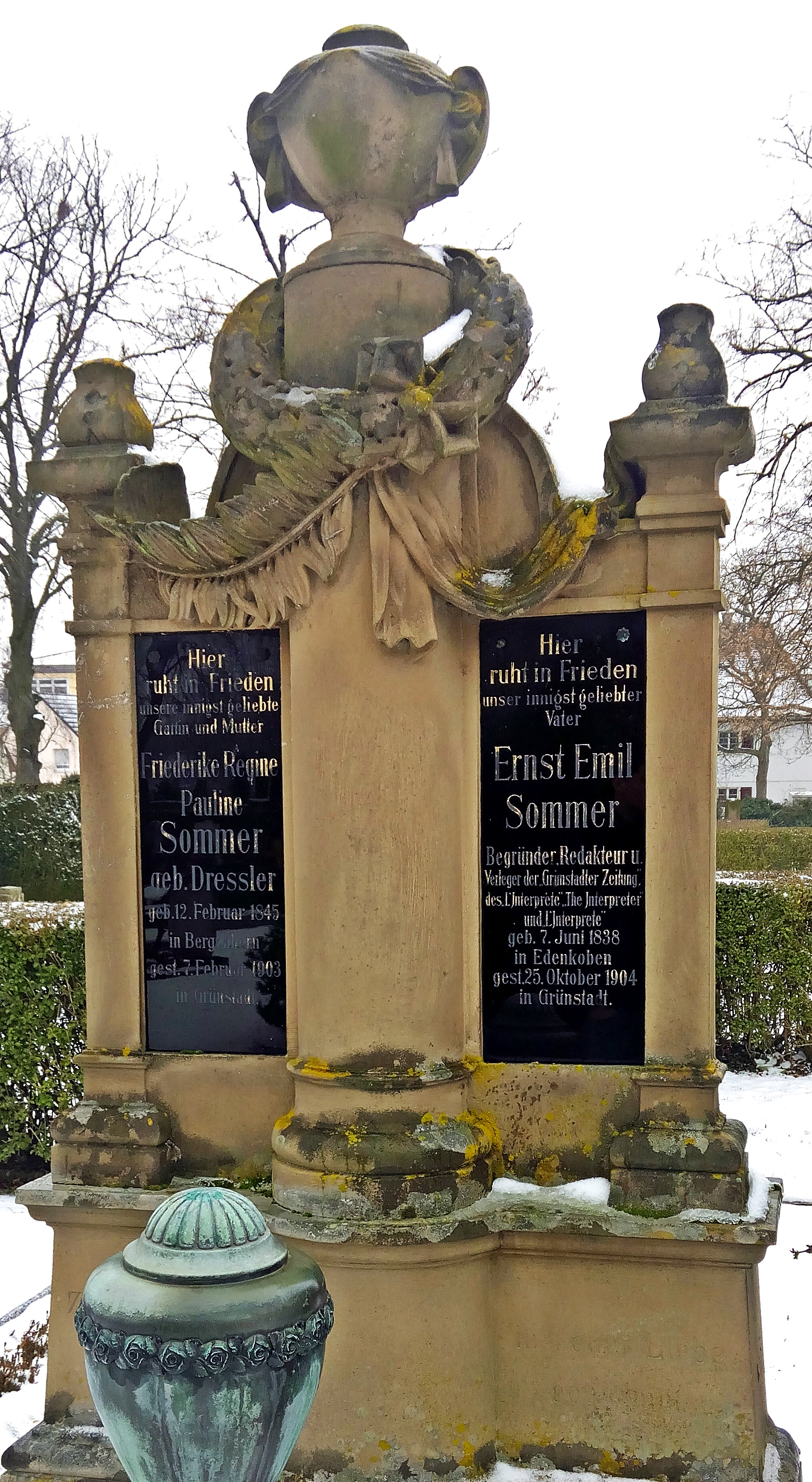 Emil Sommer (1838–1904), deutscher Verleger und Zeitungsredakteur, Grab in Grünstadt